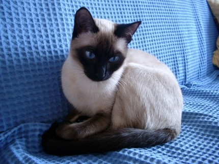 Fotografin: S. Kerl Thaikatze Madam Mim of Thai-Mahal wurde von Eigentümerin fotografiert